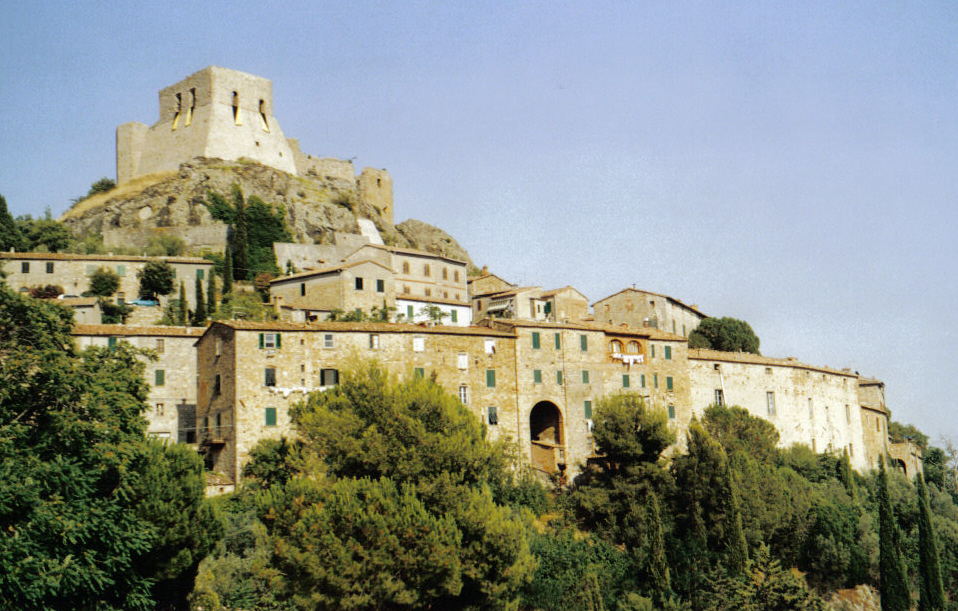 descrizione: veduta di Montemassi (GR) lavoro personale di Vinattieri Matteo che lascia in pubblico dominio il 27/01/2007; foto scattata da apparecchio non digitale nel luglio 2005 e rielaborata successivamente